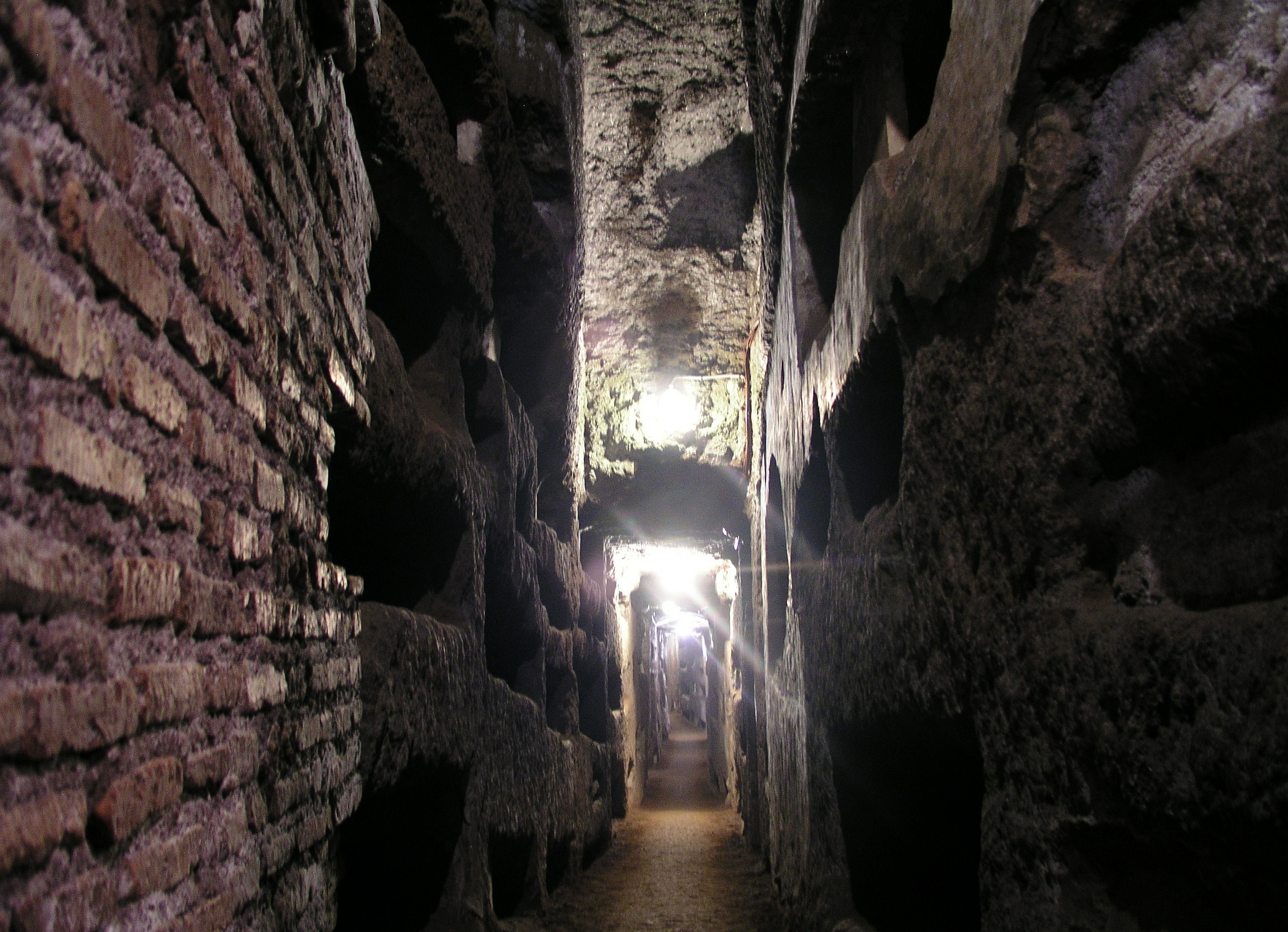 Rom, Domitilla-Katakomben, Gang mit Wandgräbern